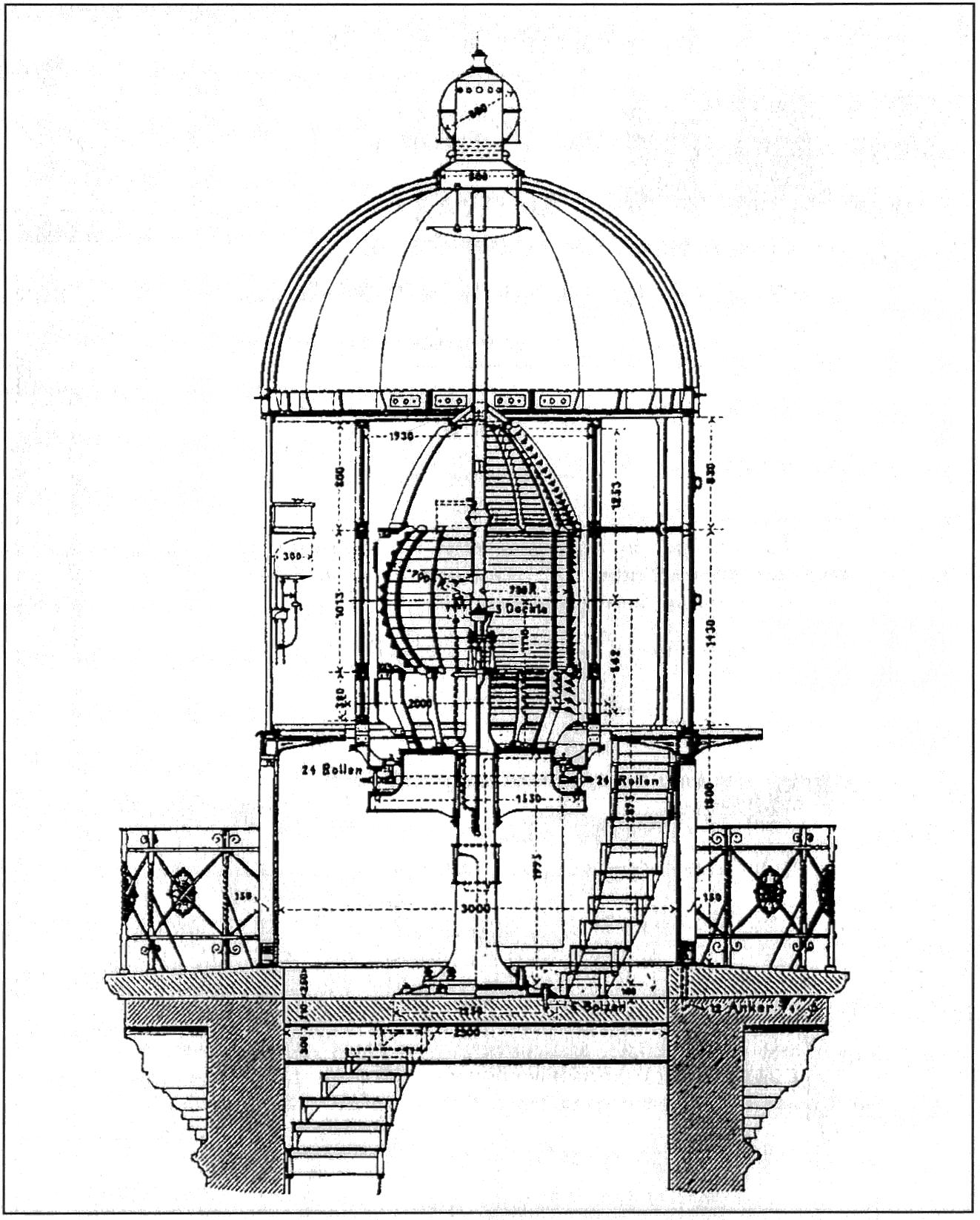 Leuchtturm Rostock-Warnemünde / Lighthouse Rostock-Warnemünde